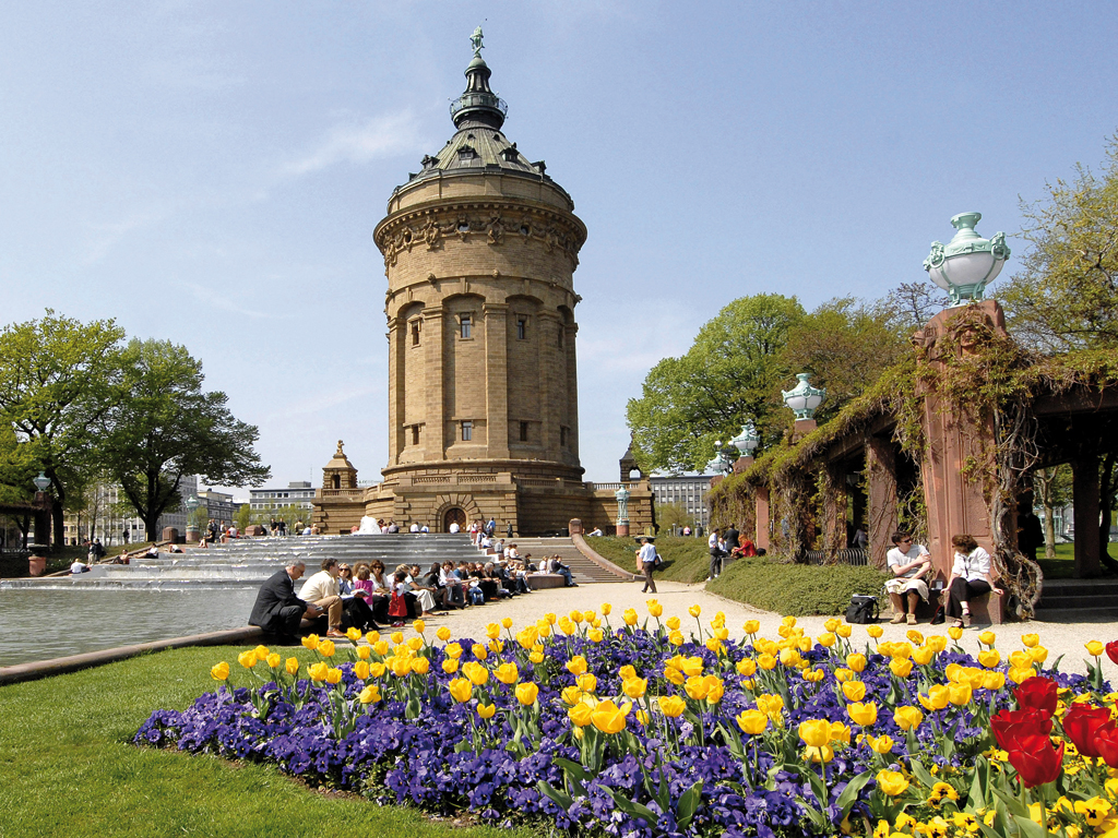 Wasserturm Mannheim. Bei Nutzung des Fotos bitte angeben: Foto: Bernhard Kunz / Stadtmarketing Mannheim GmbH